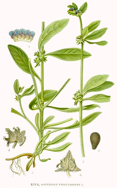 Original Description Riva, Asperugo procumbens L.